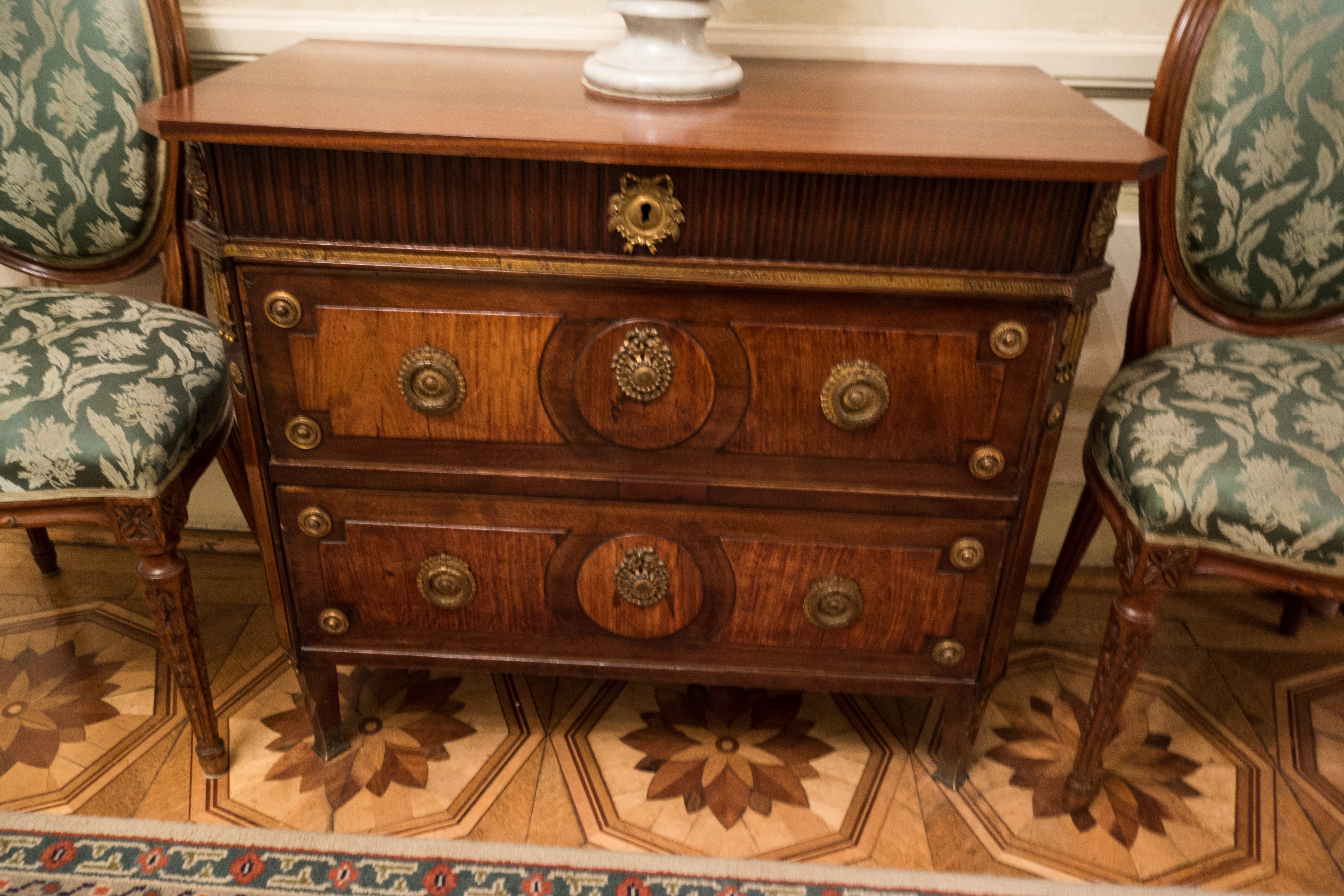 Warsaw 2015